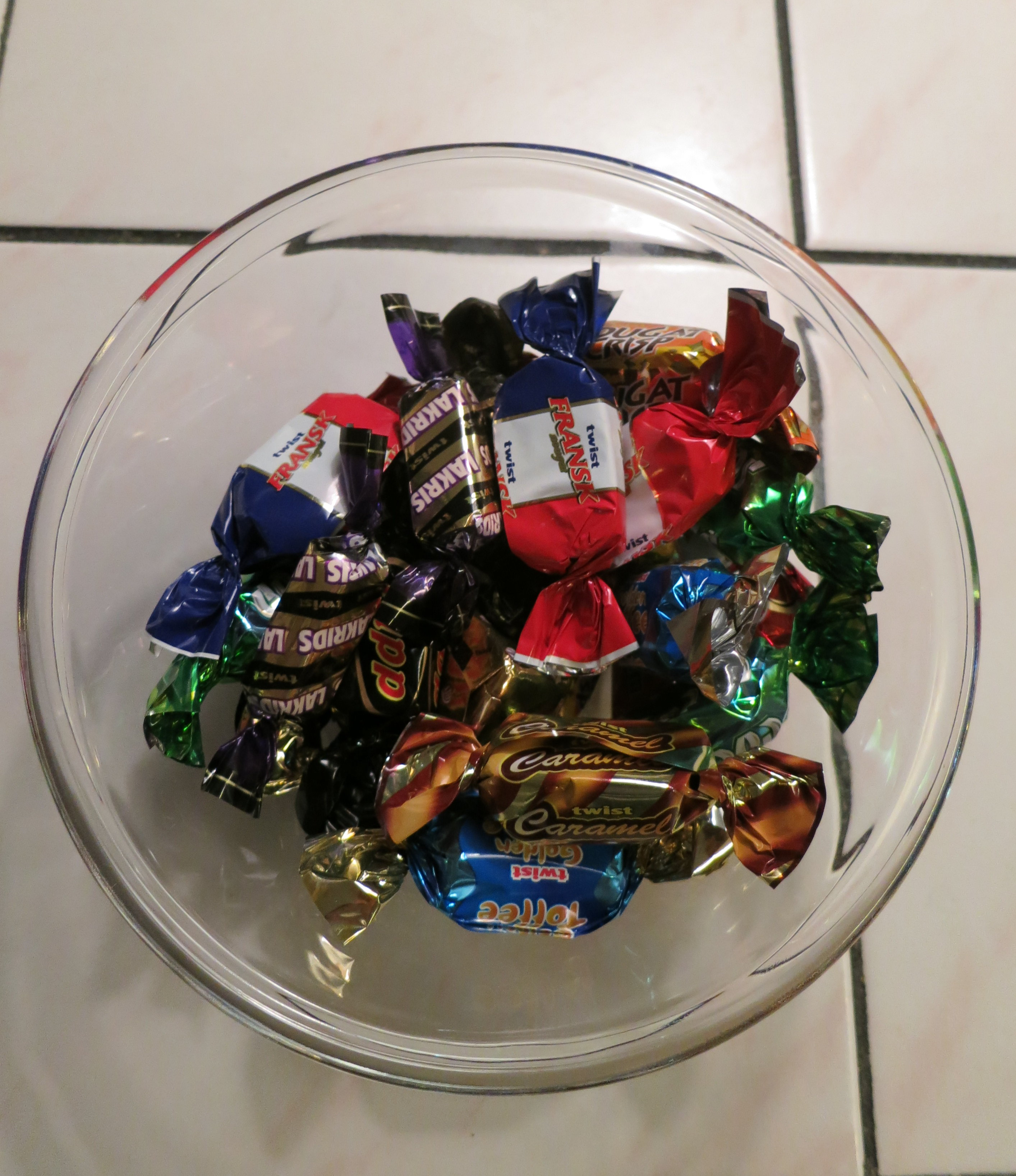 En skål med Twist-godis